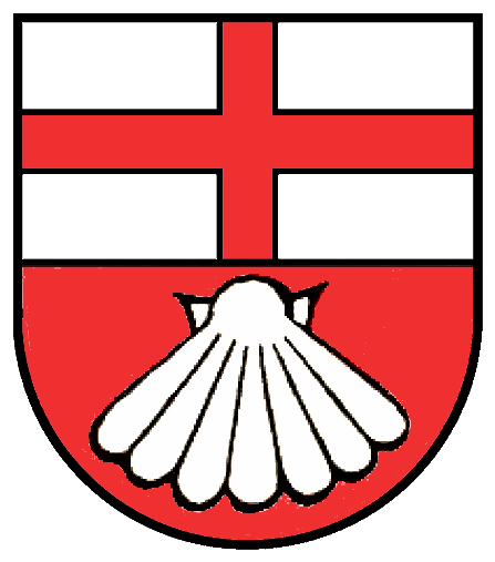 Wappen von Frohnstetten, Gde. Stetten am kalten Markt, Baden-Württemberg, Deutschland